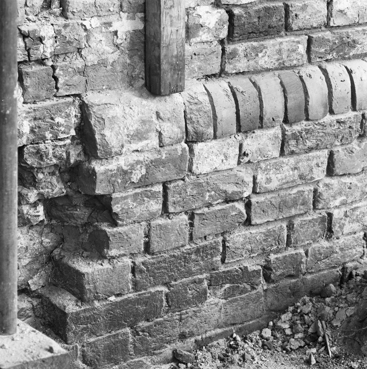 Nederlands Hervormde Kerk: exterieur plint